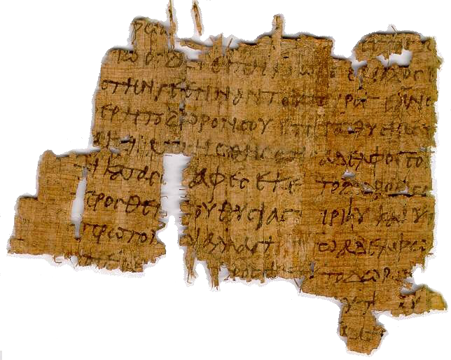 Reverso del Papiro P86 del Nuevo Testamento en griego, conteniendo los versículos 22, 23, 24 y 25 del Capítulo 5 del Evangelio según San Mateo. Fechado en torno al s. IV E.C.: 22 "Pero yo os digo que cualquiera que se enoje contra su hermano, será culpable de juicio; y cualquiera que diga: Necio, a su hermano, será culpable ante el concilio; y cualquiera que le diga: Fatuo, quedará expuesto al infierno de fuego." 23 Por tanto, si traes tu ofrenda al altar, y allí te acuerdas de que tu hermano tiene algo contra ti, 24 deja allí tu ofrenda delante del altar, y anda, reconcíliate primero con tu hermano, y entonces ven y presenta tu ofrenda. 25 Ponte de acuerdo con tu adversario pronto, entre tanto que estás con él en el camino, no sea que el adversario te entregue al juez, y el juez al alguacil, y seas echado en la cárcel." Mt 5: 22-25